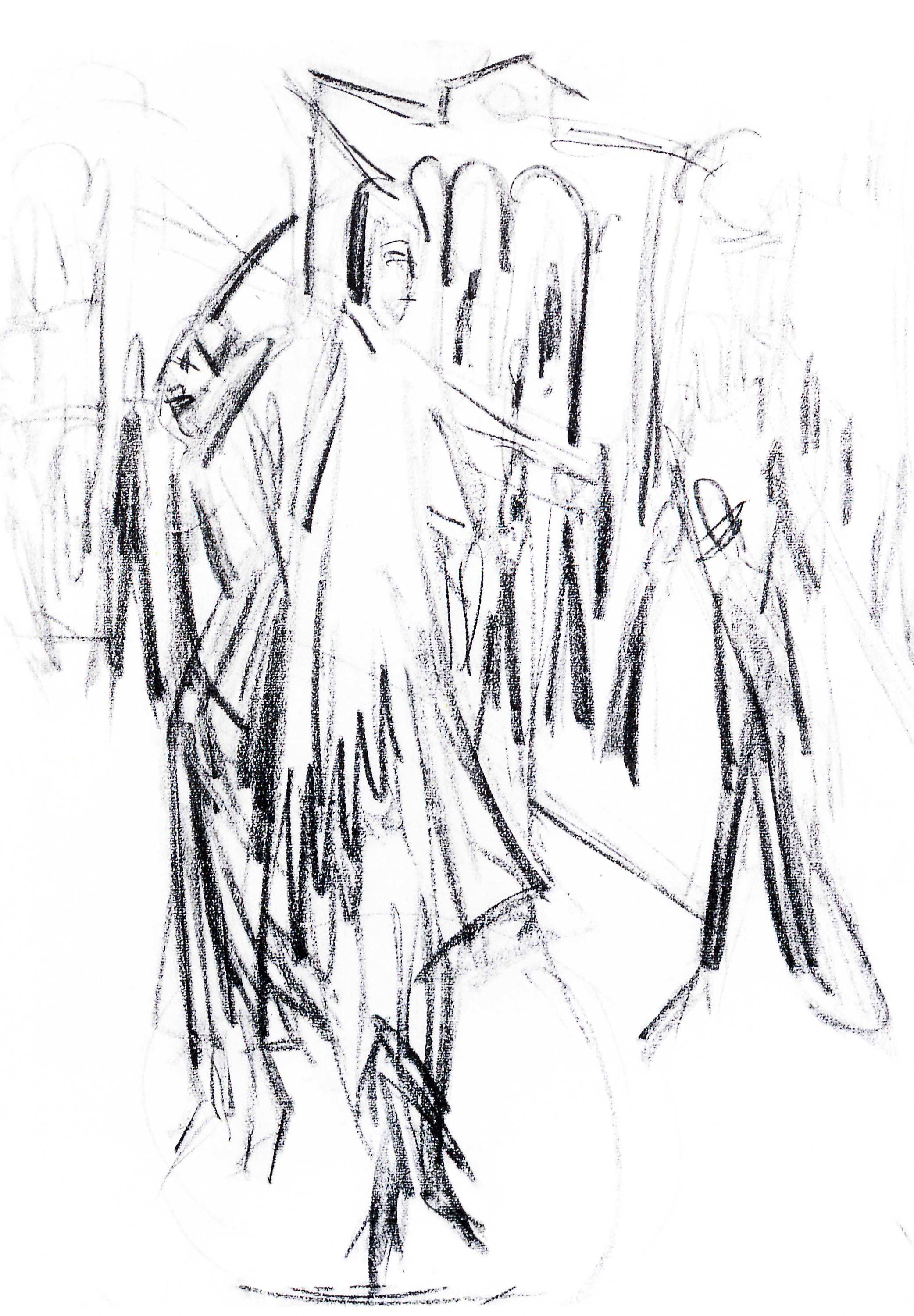 Ernst Ludwig Kirchner Frauen am Potsdamer Platz Kohle auf Bütten 1914